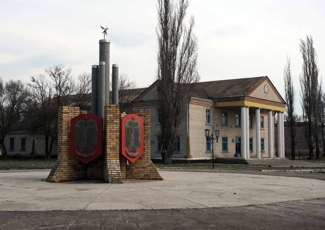 Центр села Шелюги Акимовского района Запорожской области, Украина